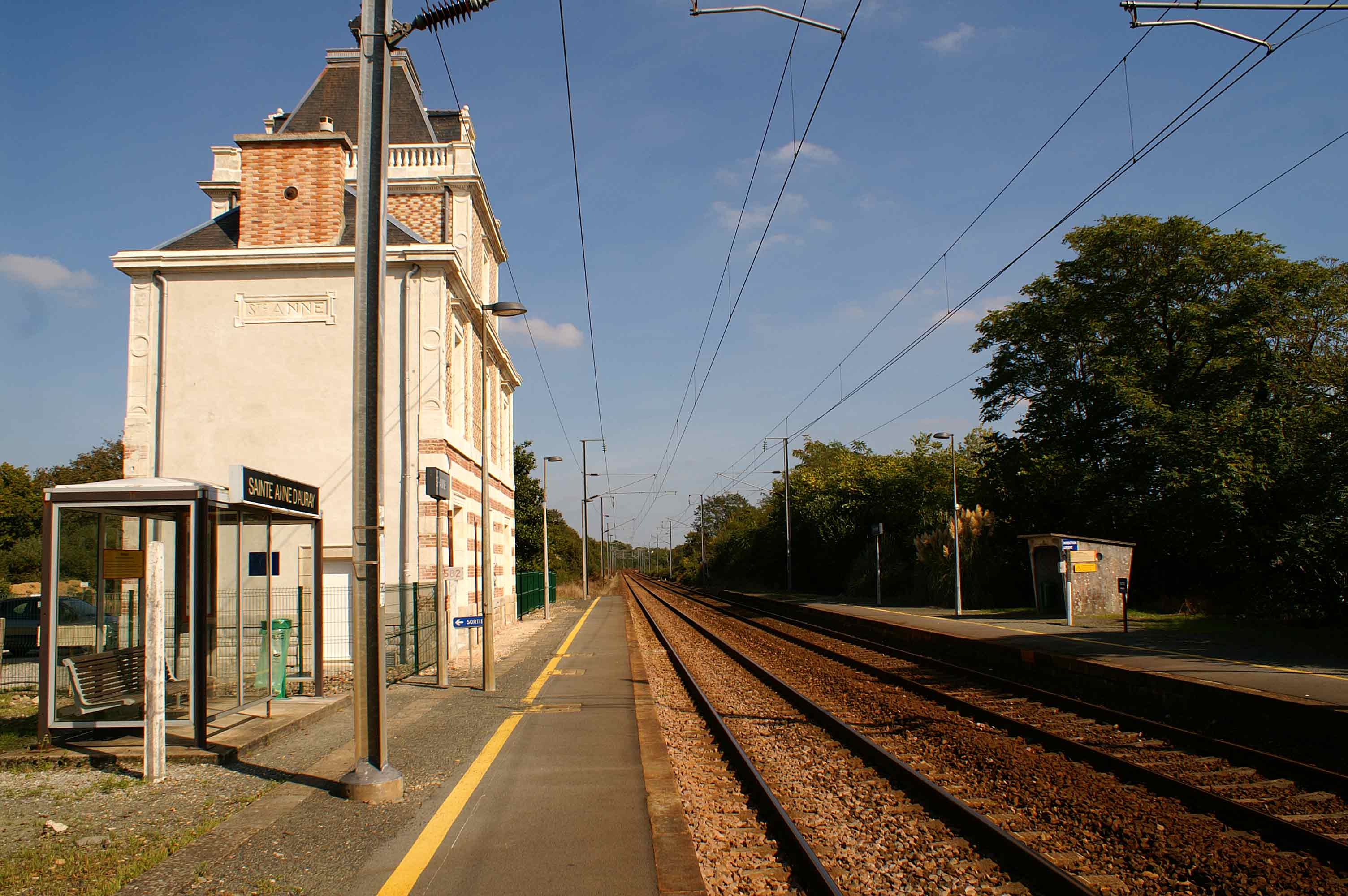 Gare Sainte-Anne (Morbihan) l'ancien bâtiment voyageur, les voies en direction de Questembert, les quais avec les abris pour l'arrêt des TER Bretagne.